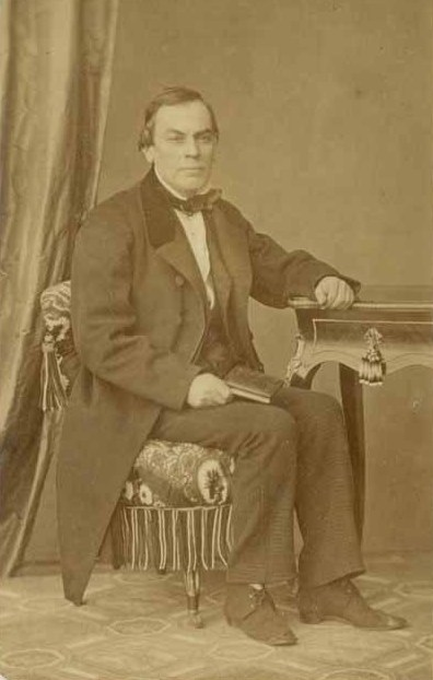 José Agustín de Dios Edwards Ossandón (La Serena, 2 de abril de 1815 - Limache, 2 de septiembre de 1878) fue un empresario y político chileno. Hijo del fundador de la familia Edwards en Chile, George Edwards Brown e Isabel Ossandón Iribarren. Agustín Edwards se casó con su sobrina Juana Ross Edwards con quien tuvo siete hijos, entre ellos, Agustín Edwards Ross.